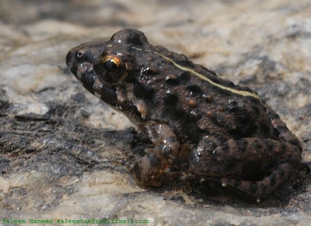 Fejervarya limnocharis , Bannerghatta, India